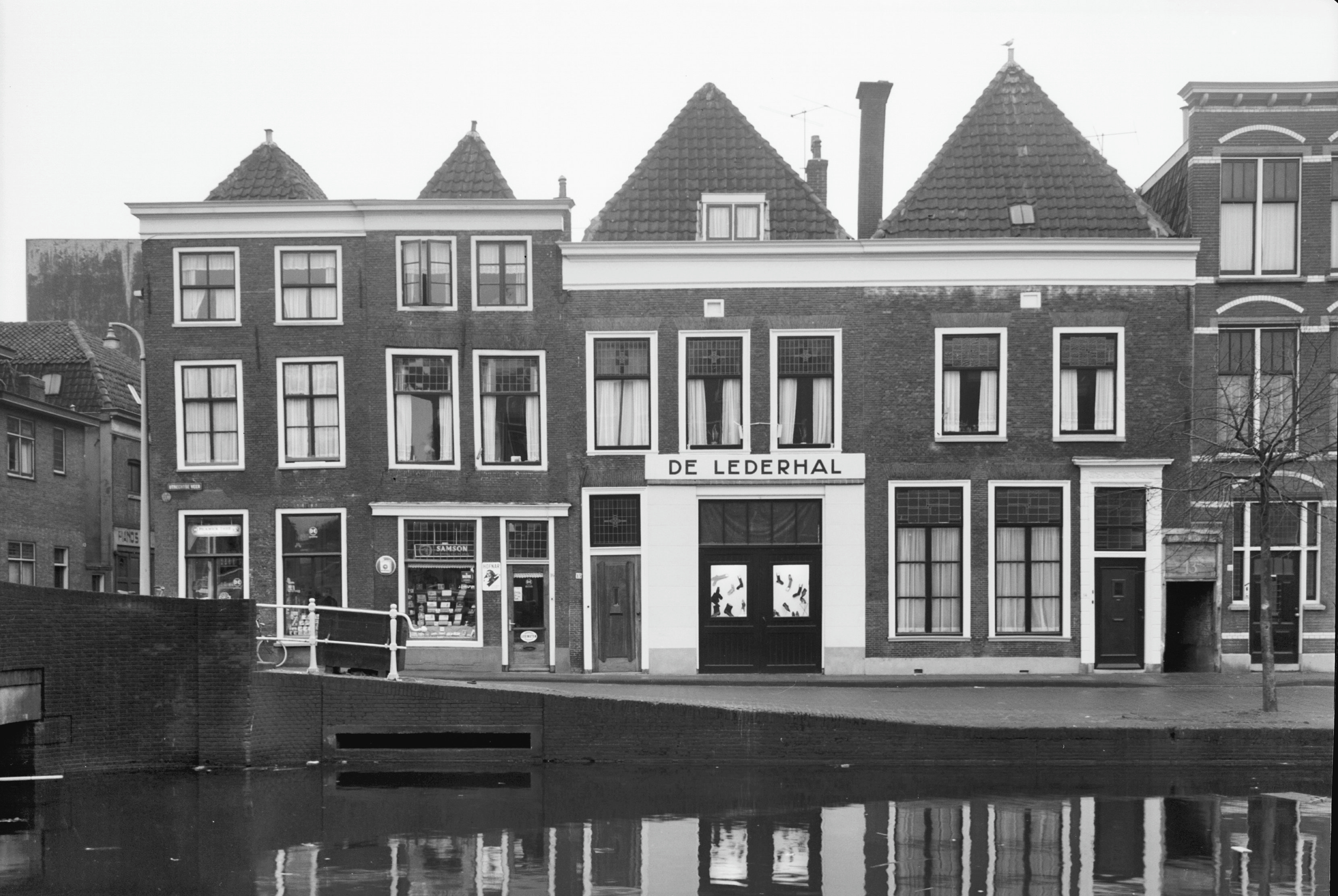 gevels